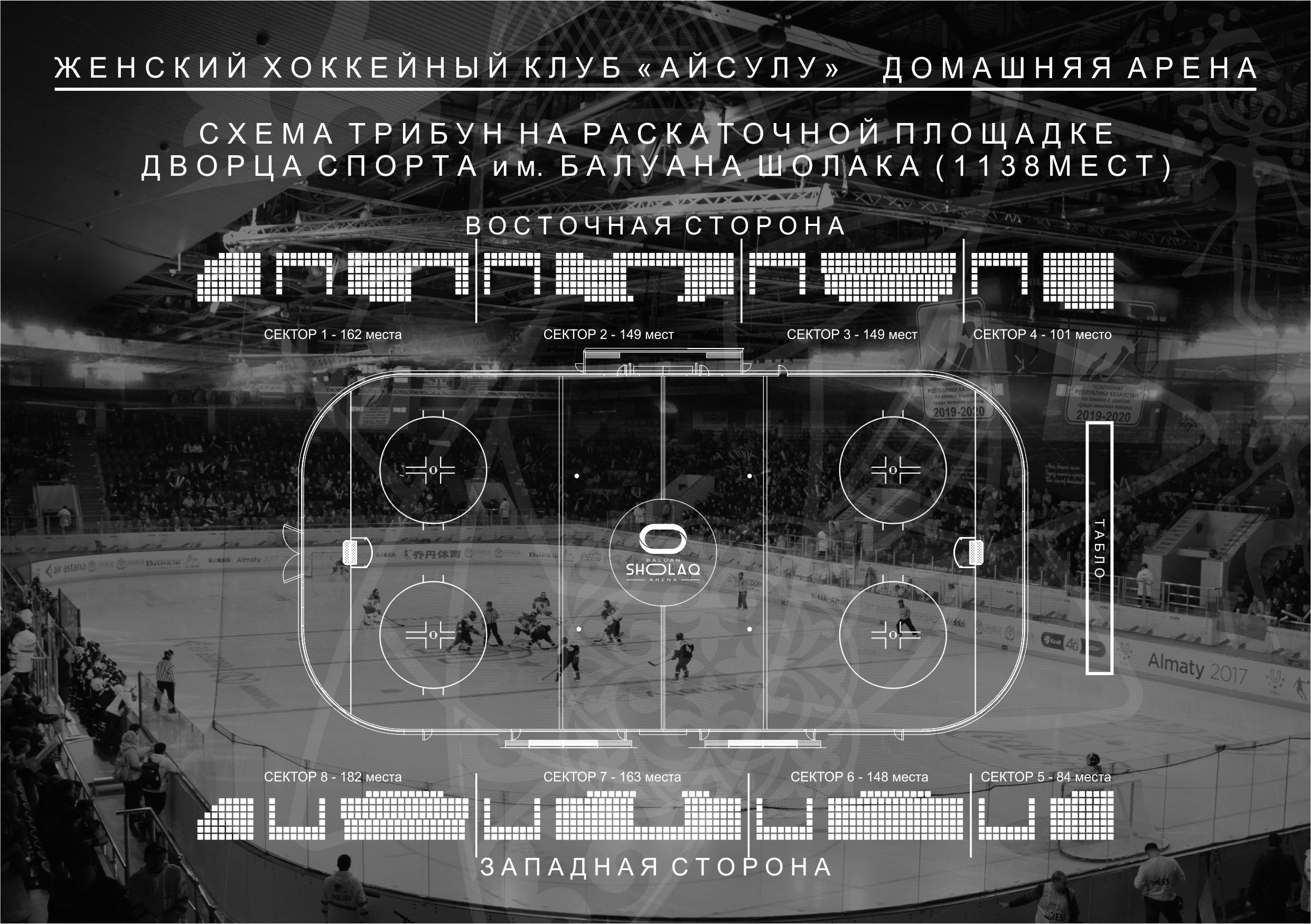 Дворец спорта им. Балуана Шолака